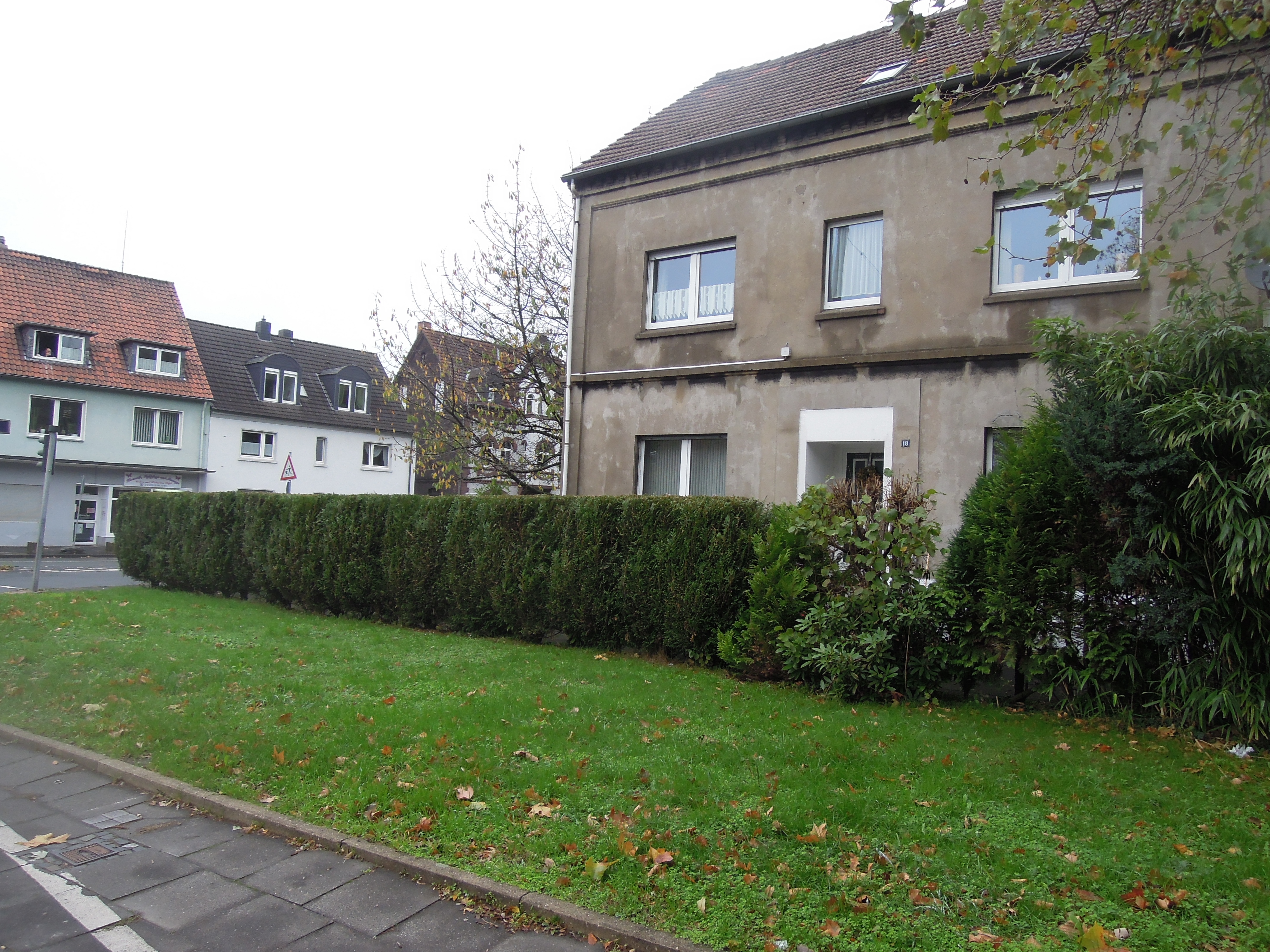 Lage der Stolpersteine mit Haus Holzstr 18